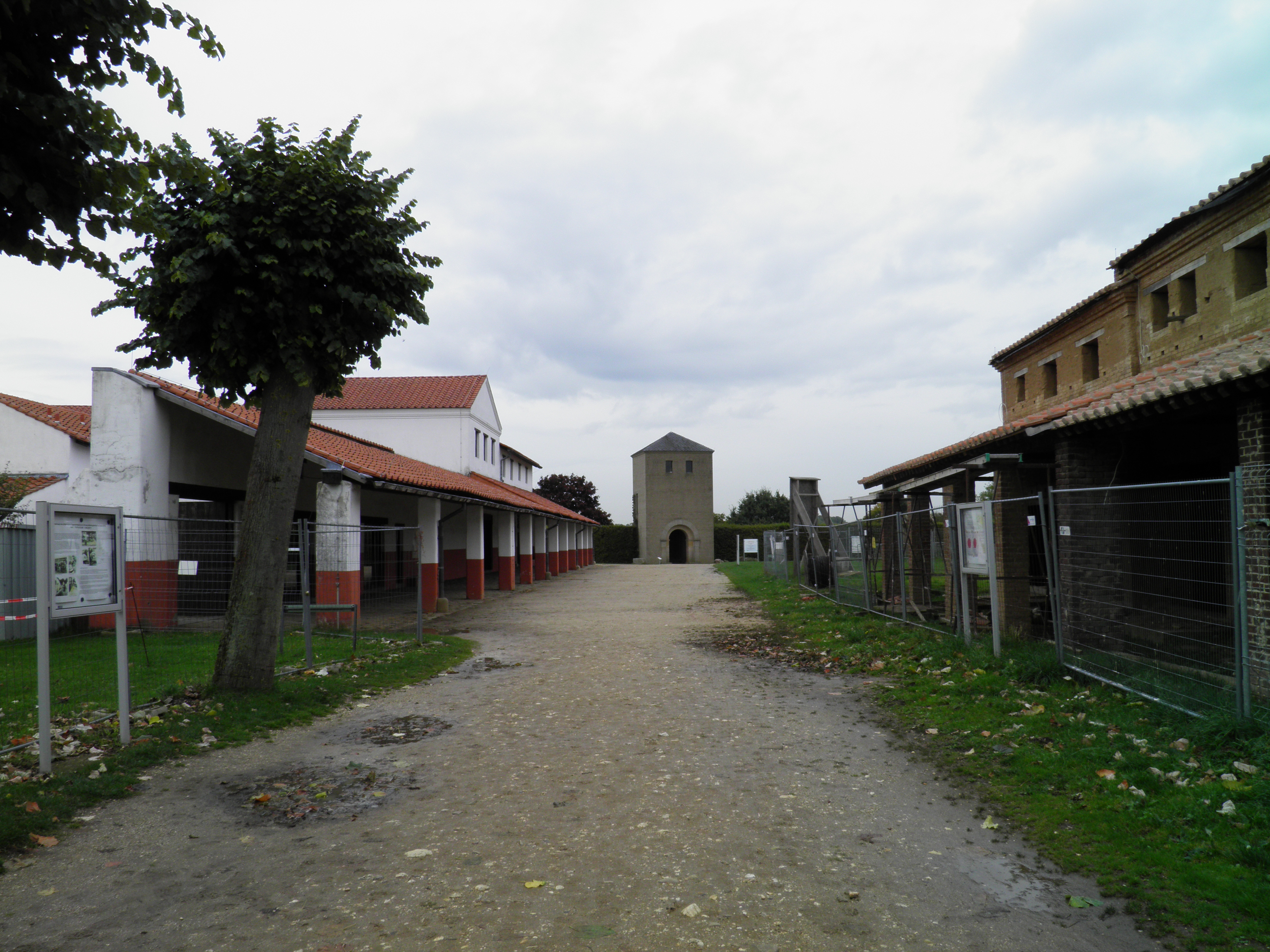 Xanten, Germany